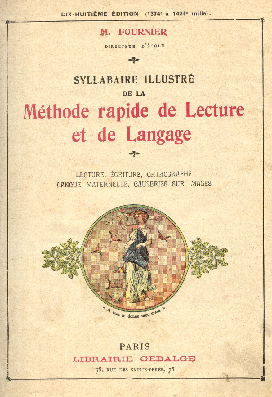 Mathieu Fournier, Syllabaire illustré, 18e édition